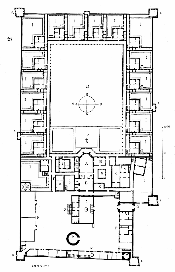 Projet de restauration - plan de la chartreuse dite de Clermont. Nous devons ce plan à l’obligeance de M. Mallay, architecte diocésain de Clermont-Ferrand, qui a bien voulu nous envoyer un calque de l’original. La grande chartreuse de Clermont est située à 50 kilom. de cette ville du côté de Bourg-Lastic ; le plan que nous présentons est un projet de restauration qui n’a pas été entièrement exécuté, mais il a pour nous cet avantage de fournir un ensemble complet, dans lequel les services sont étudiés et disposés avec soin.